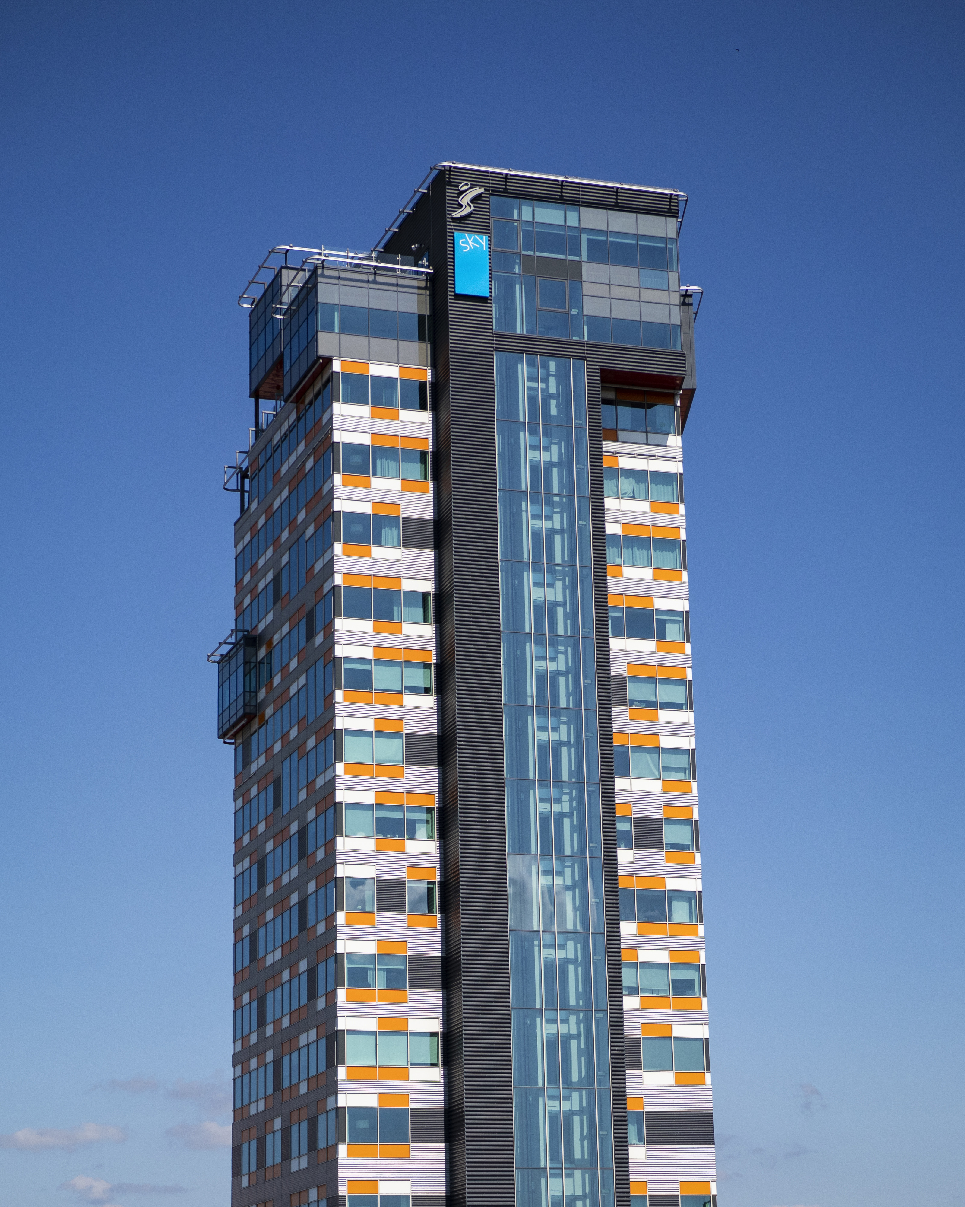 Byggnaden Tornet, Stångåstadens huvudkontor beläget i stadsdelen Tornby i Linköping.